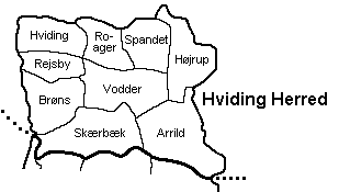 Hviding Herred, Tønder Amt, Danmark.